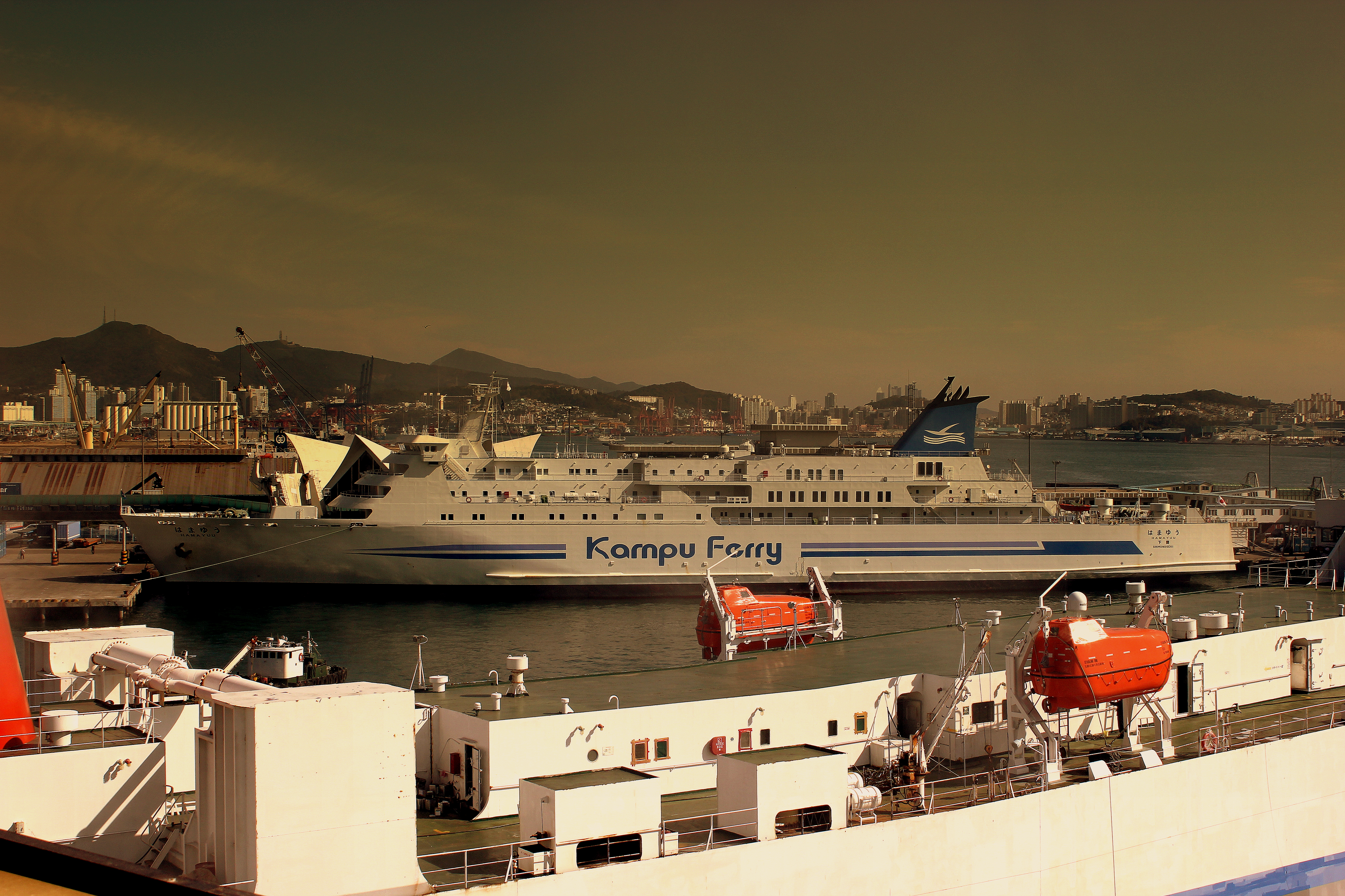 KAMPU FERRY PORT OF BUSAN SOUTH KOREA OCT 2012